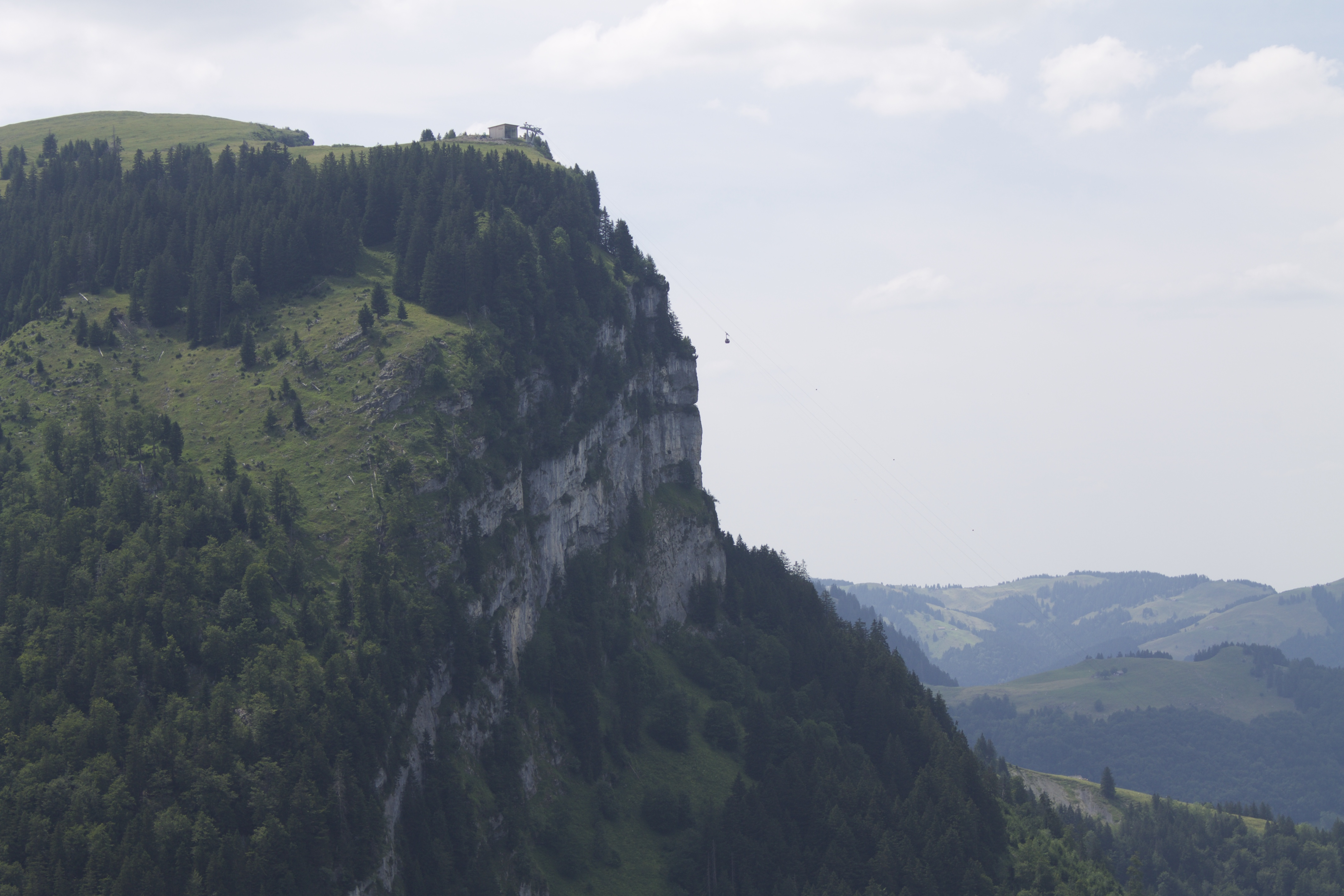 Hoher Kasten